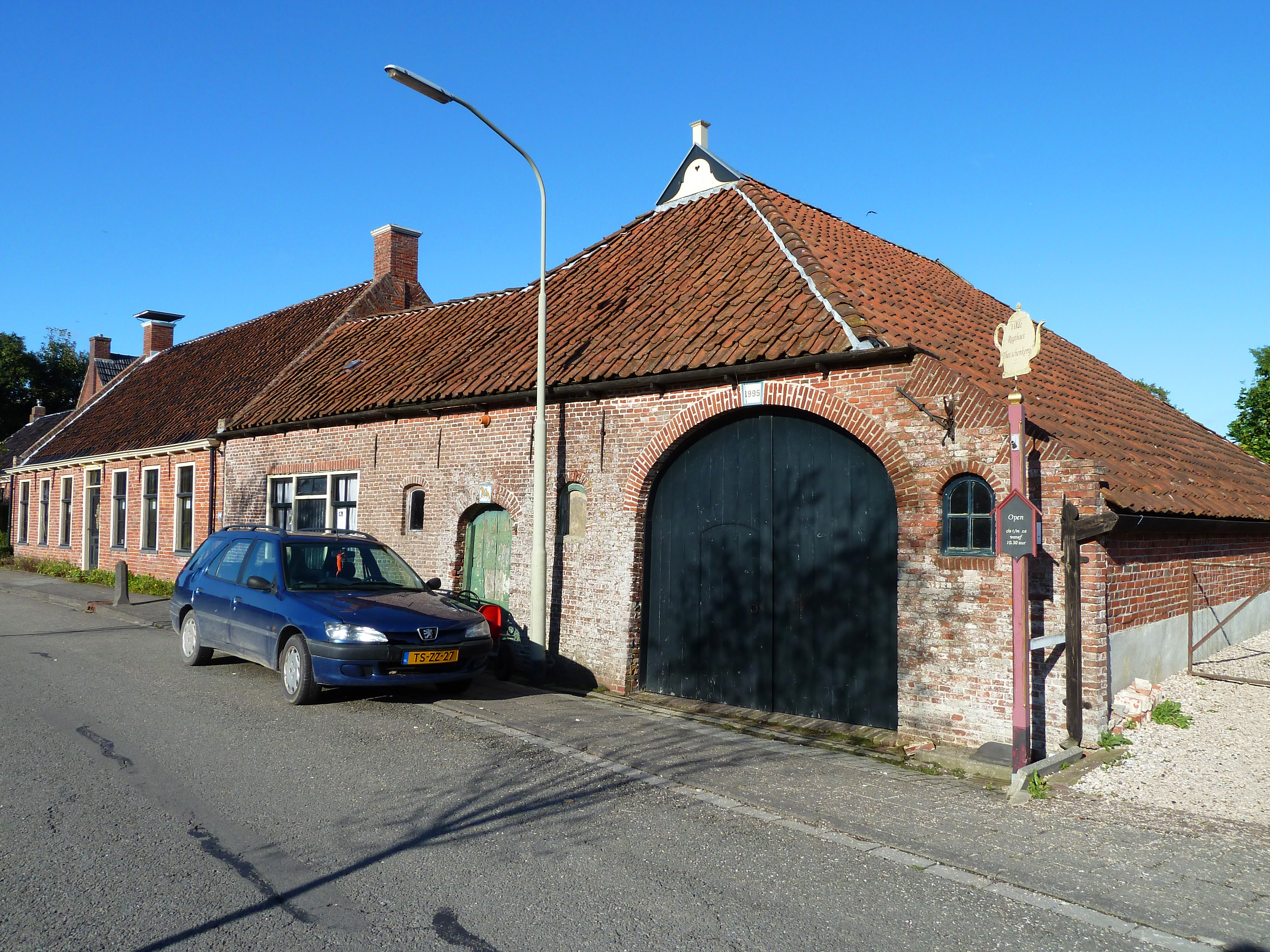 Oude rechthuis van Westeremden. Waarschijnlijk gebouwd in 1607. In de jaren 1980 gerestaureerd.